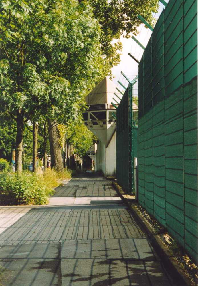 Aussenmauer der JVA Bochum Krümmede in Bochum, eigenes Bild, GNU FDL